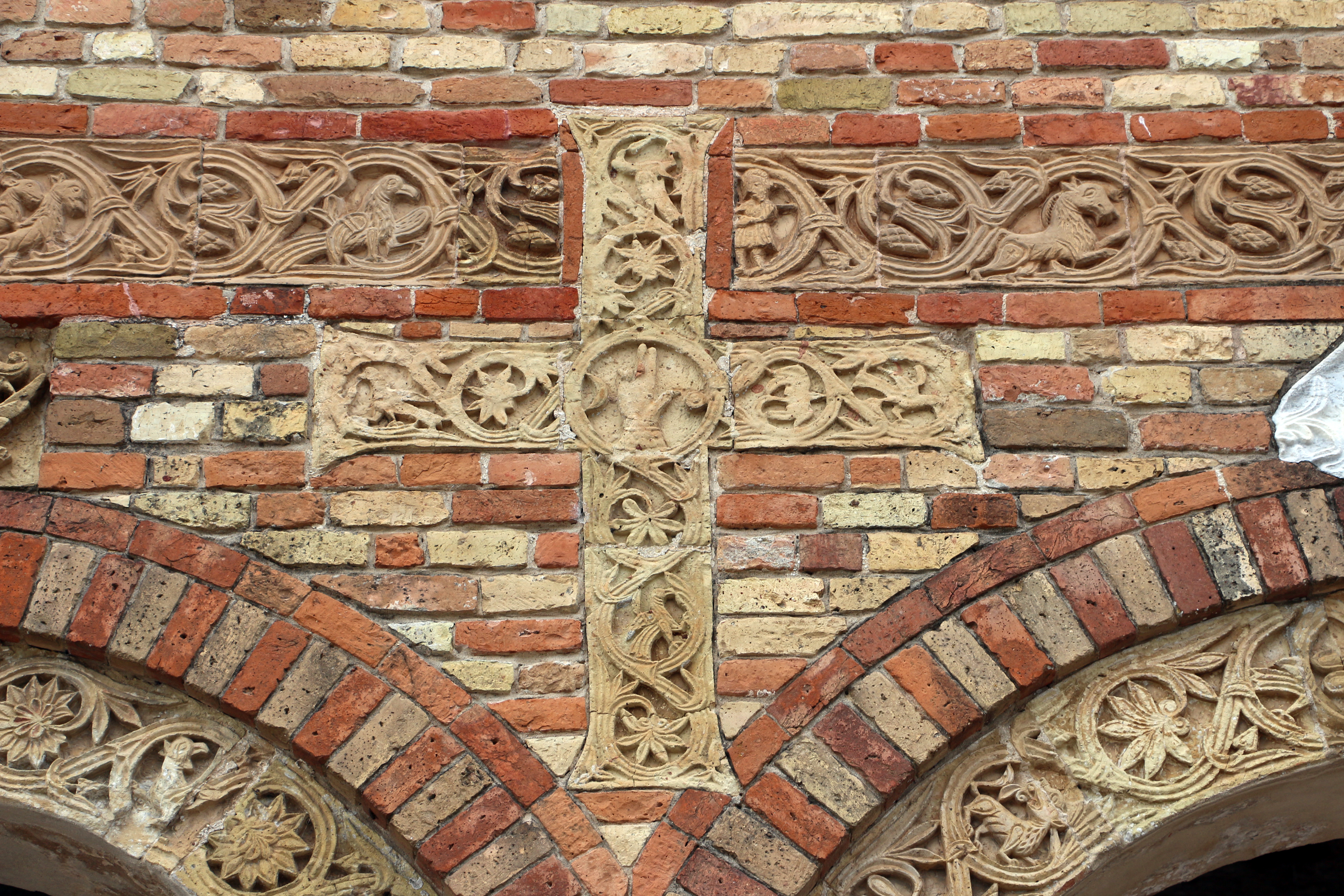 Abbazia di Pomposa This is a photo of a monument which is part of cultural heritage of Italy.